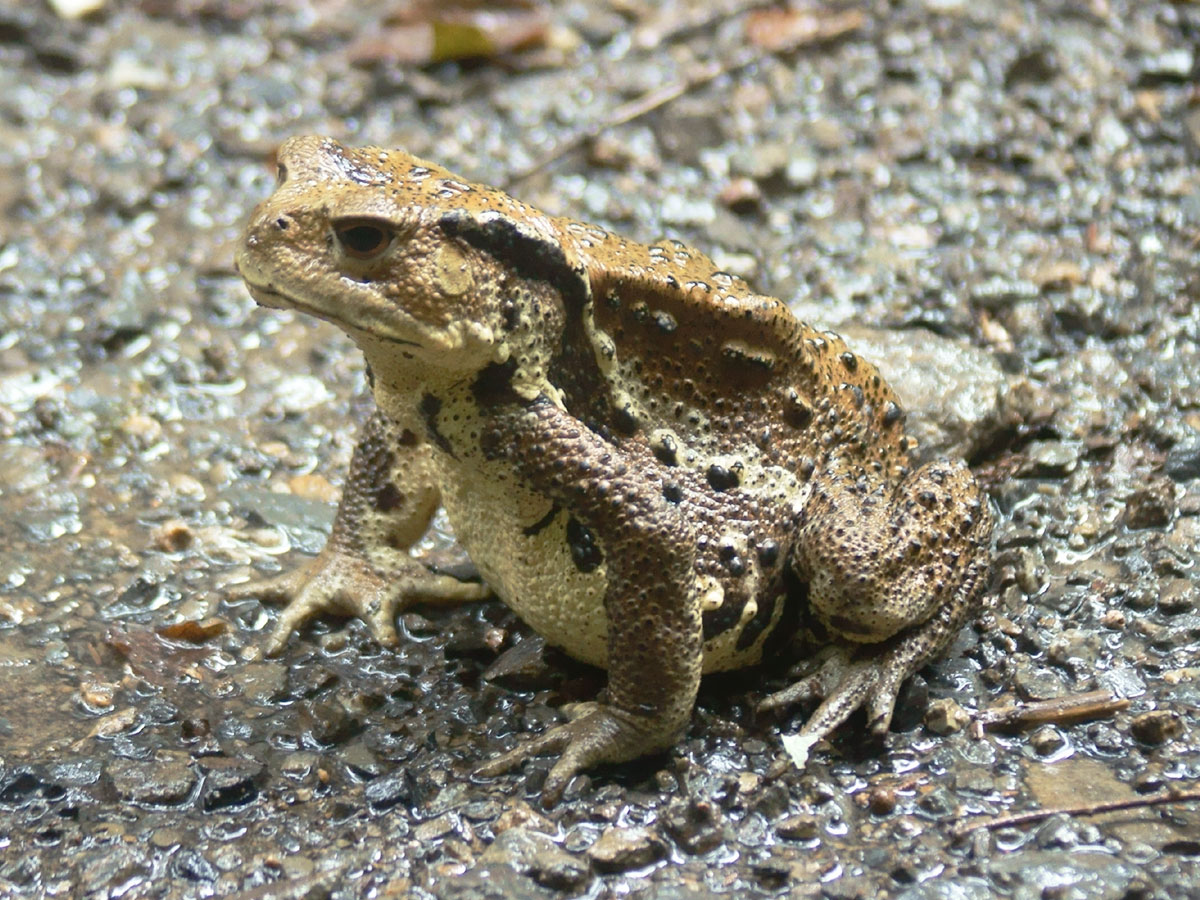 ナガレヒキガエル、2011年８月５日、京都市左京区。